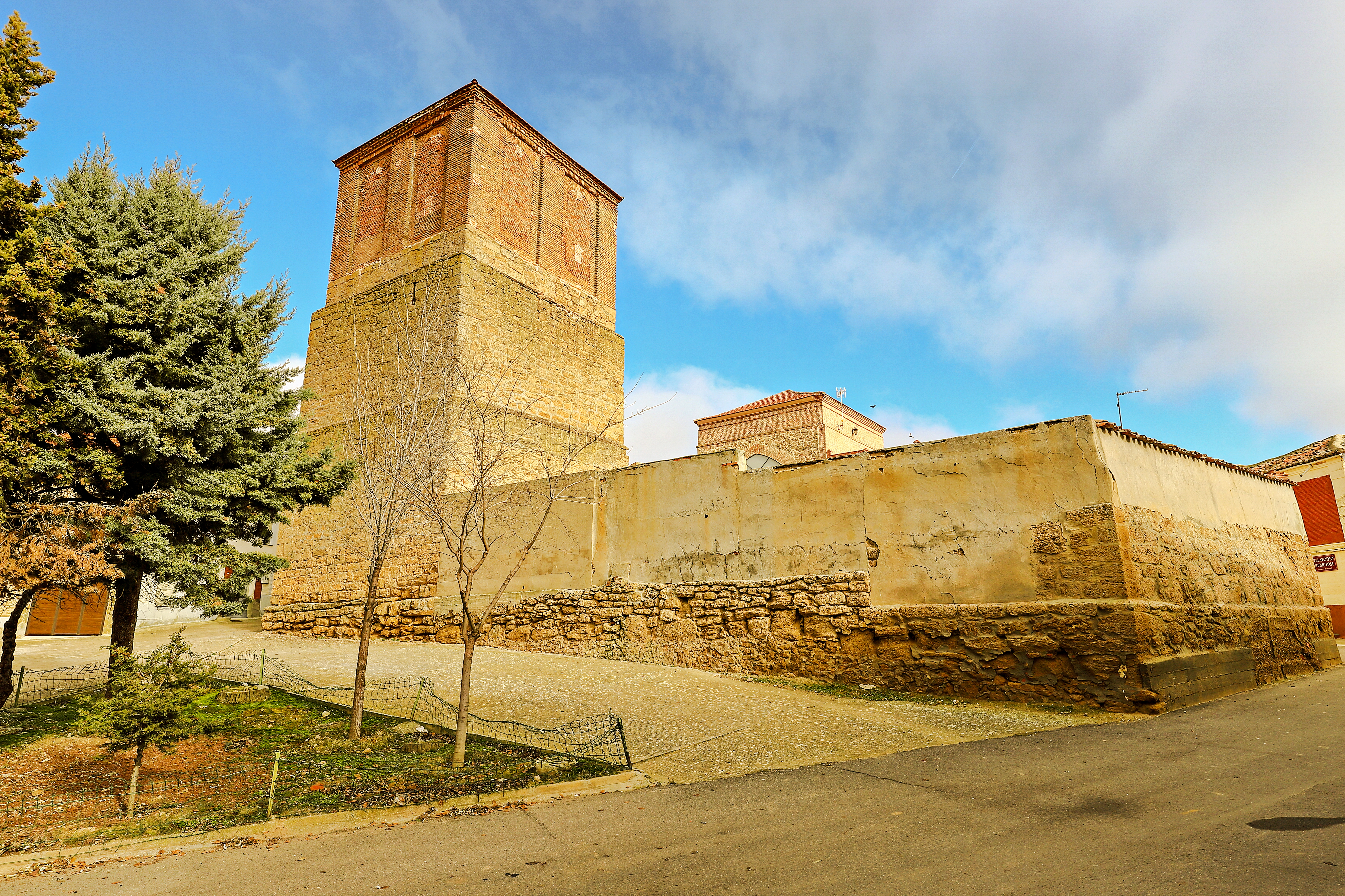 Fuentes de Ropel es un municipio de la comarca Benavente y Los Valles, provincia de Zamora.